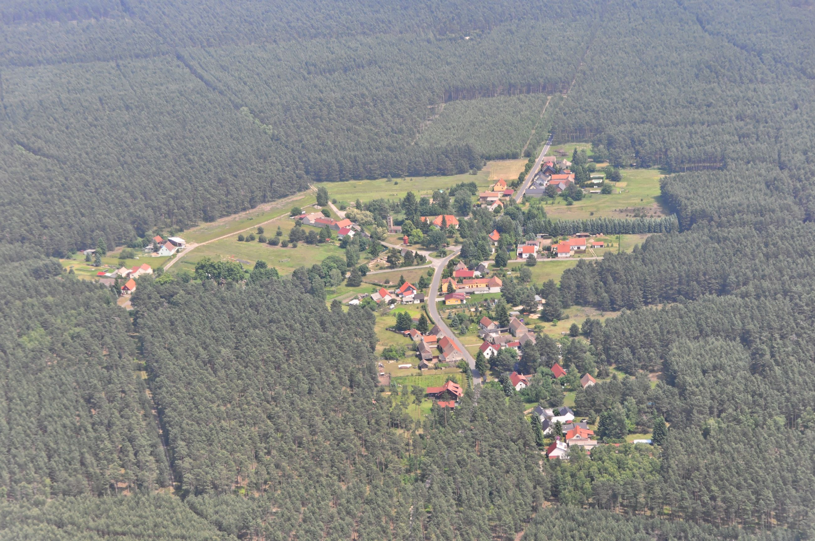 Schwarzenburg auf einem Überführungsflug vom Flugplatz Schwarzheide-Schipkau über Potsdam, Lüneburg zum Flugplatz Nordholz-Spieka